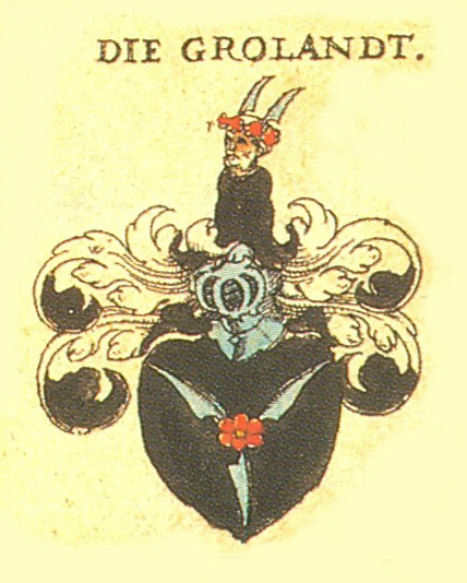 Wappen der Nürnberger Patrizierfamilie Groland von Ödenberg